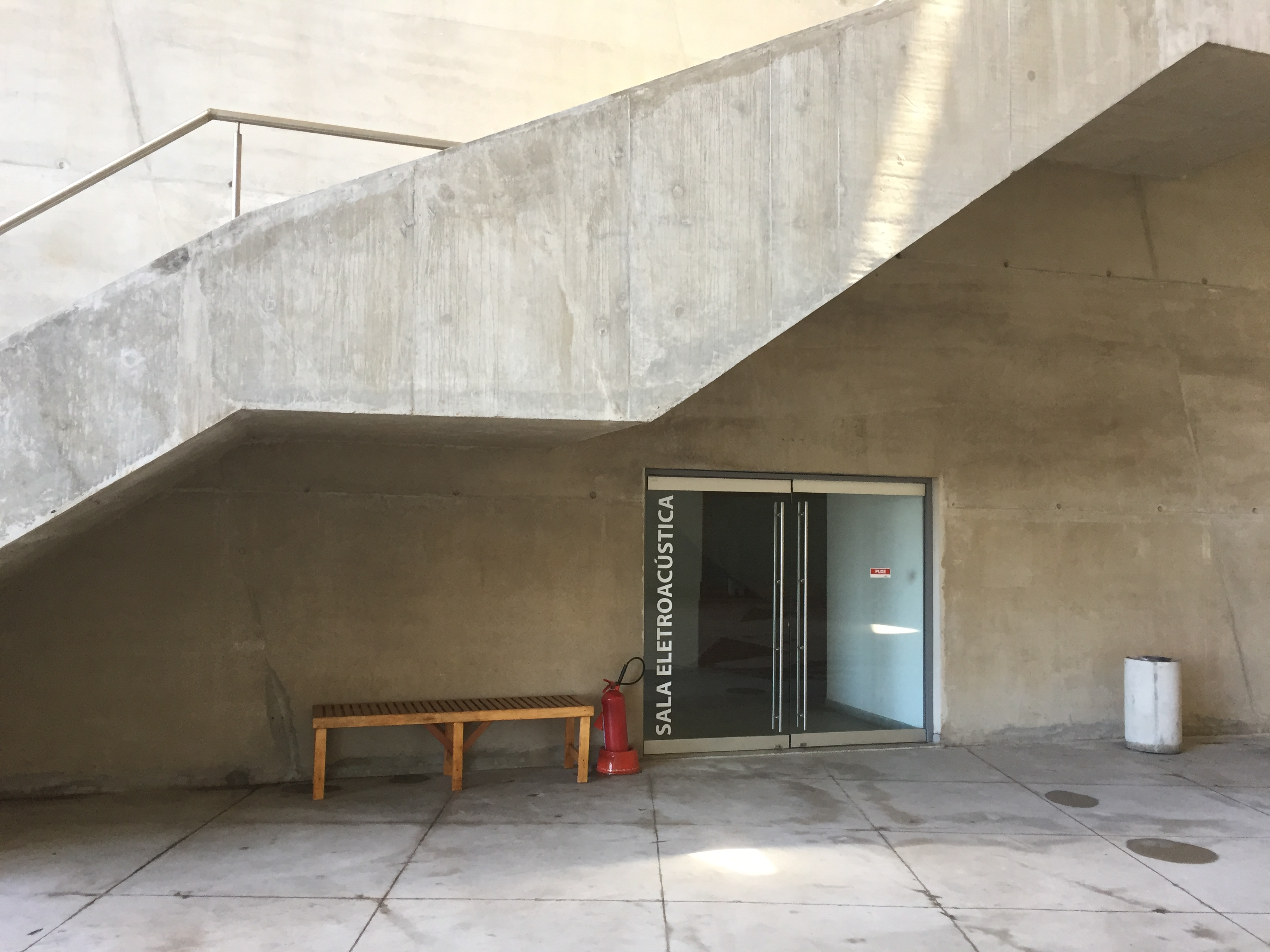 Detalhes da Cidade das Artes. Na foto, a Sala de Música Eletroacústica.